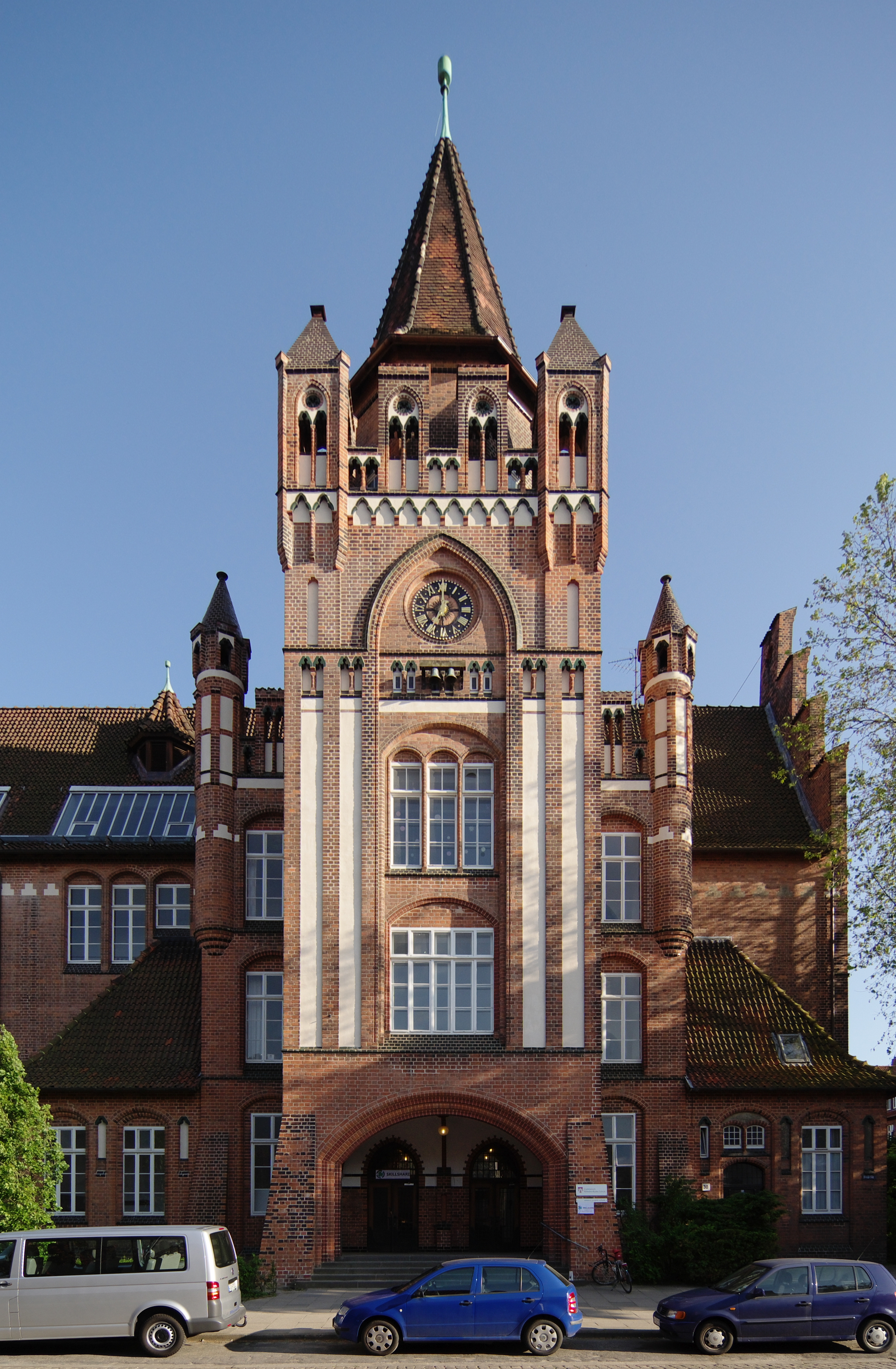 Wilhelm-Raabe-Schule (Gymnasium) in Lüneburg in Niedersachsen, Deutschland.